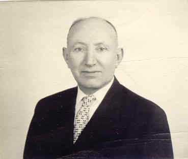 פרופ' מרדכי מרגליות